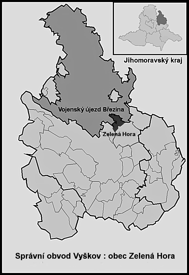 Hranice Zelená_hora (Vyškov- czech republic)